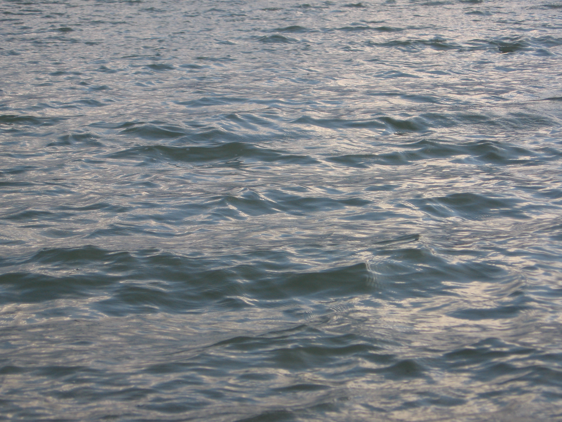 golven